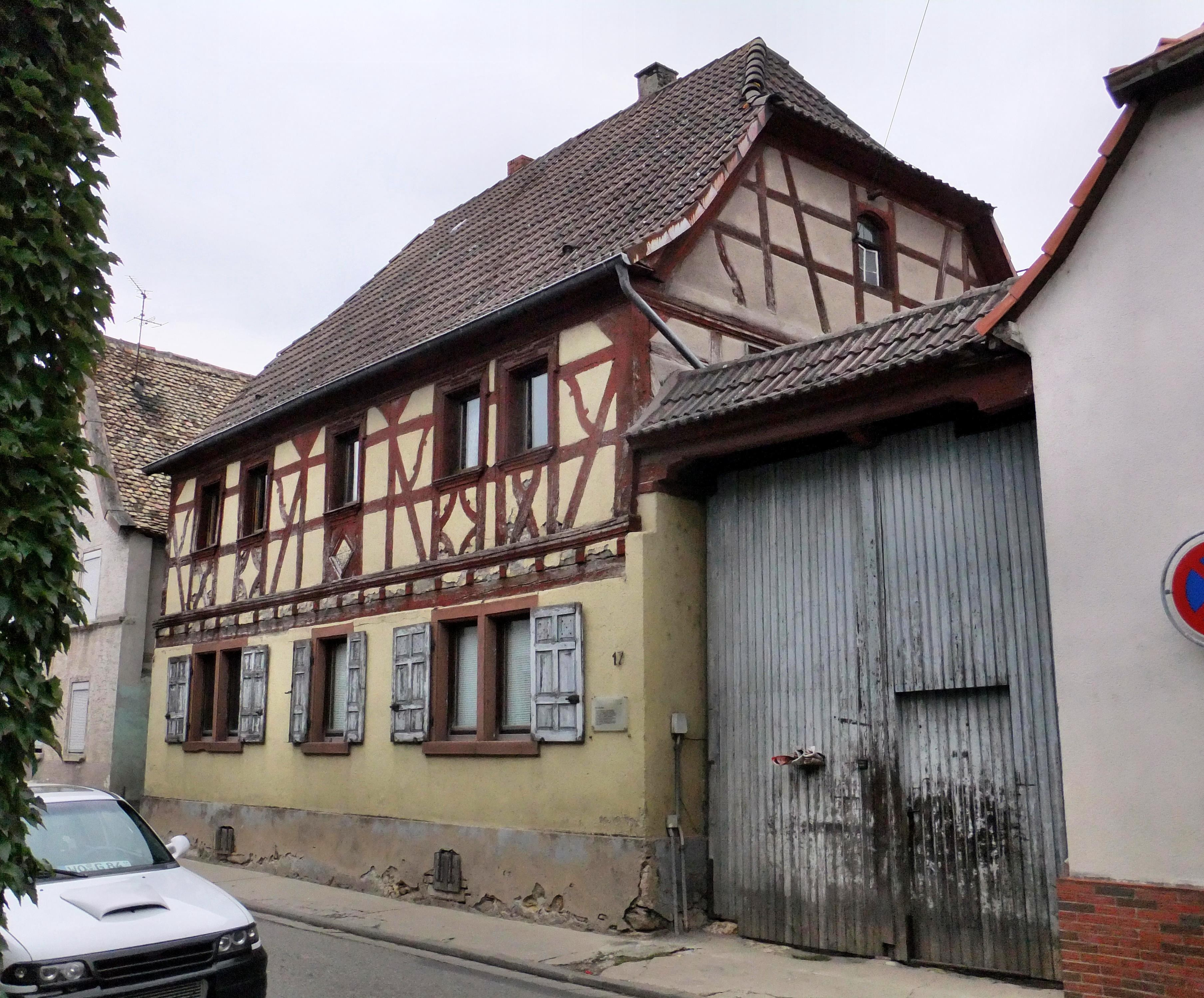 Das alte Forsthaus in der rheinhessischen Ortsgemeinde Gimbsheim in Rheinland-Pfalz (Deutschland)